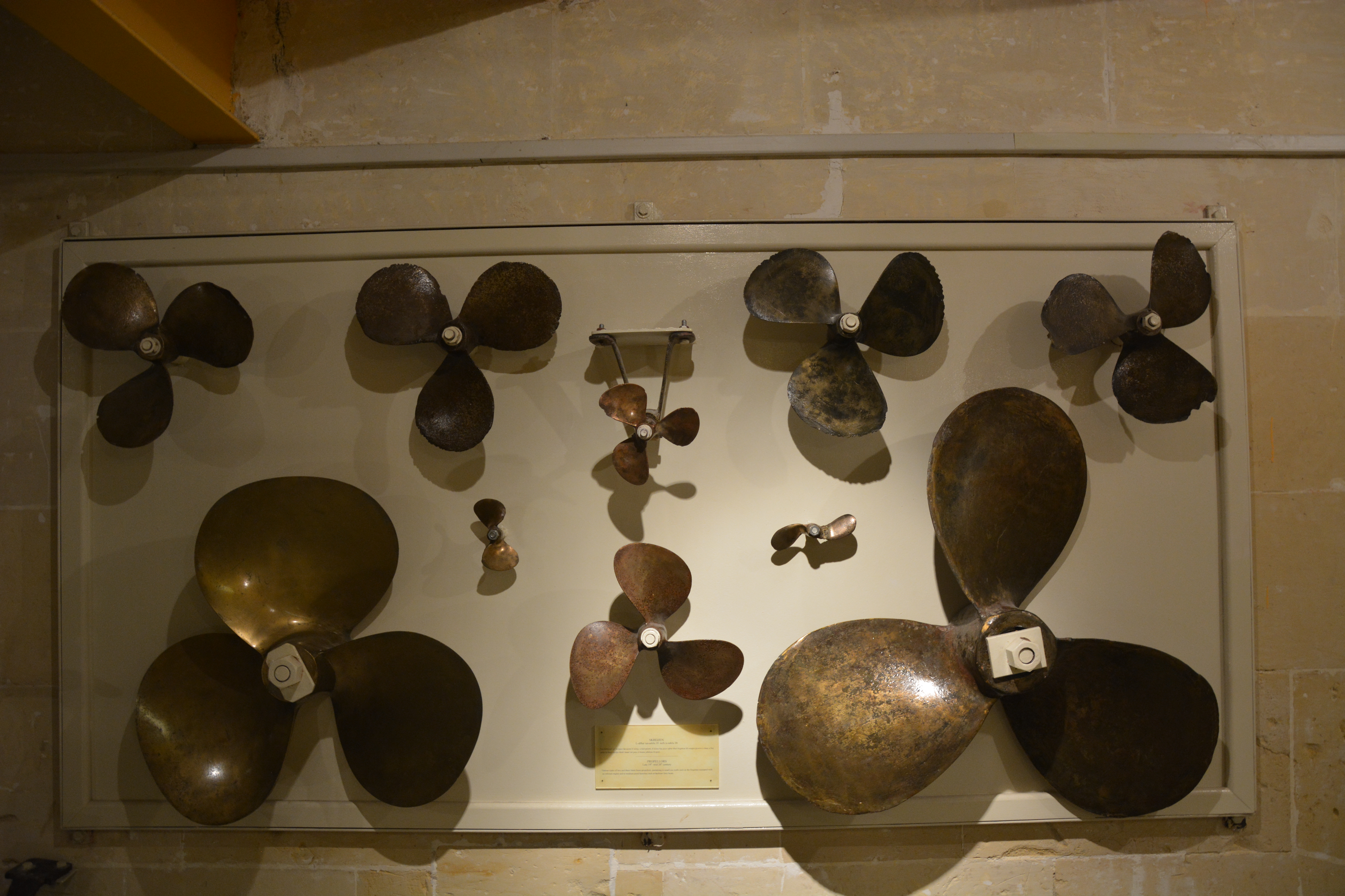 Collection d'hélices au "Malta Maritime Museum", Birgu, Malte